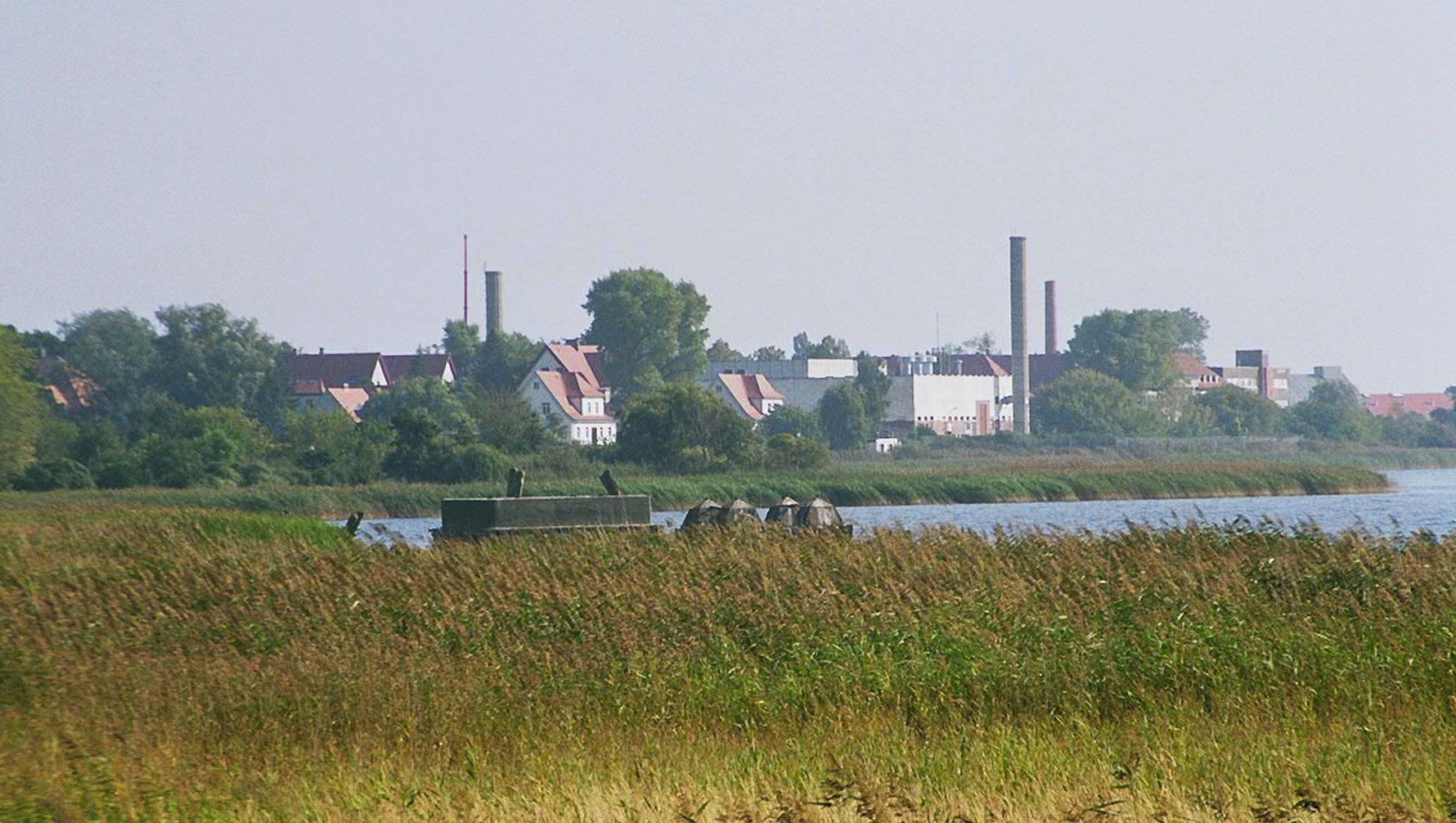 Source: made by WikiTour 2005 Description: (de:) Blick auf die Insel Riems, Sperrzone, im Wasser hinter dem Schilfgürtel ein Fundamentrest der alten Seilbahn